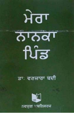 ਪੰਜਾਬੀ: ਡਾ. ਵਣਜਾਰਾ ਬੇਦੀ ਦੀ ਕਿਤਾਬ ਮੇਰਾ ਨਾਨਕਾ ਪਿੰਡ ਦਾ ਸਰਵਰਕ